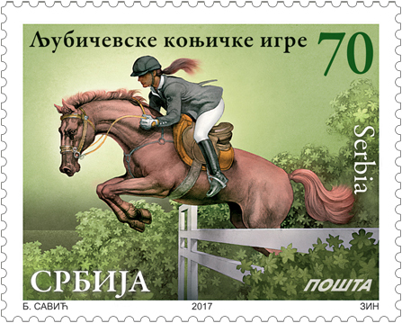 Ljubičevo Equestrian Games